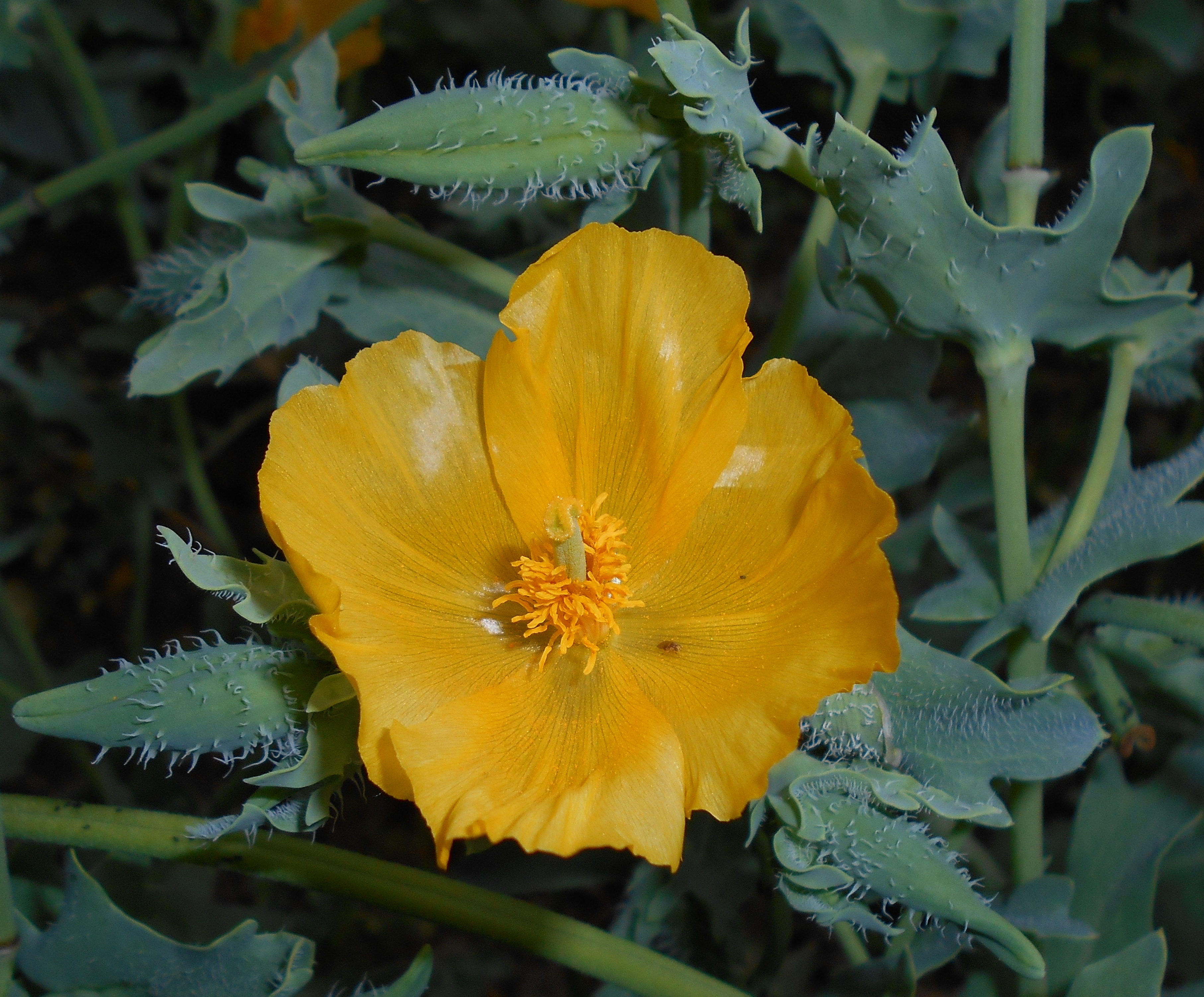 Siwiec żółty (Glaucium flavum), Ogród Botaniczny UMCS, Lublin, Polska.